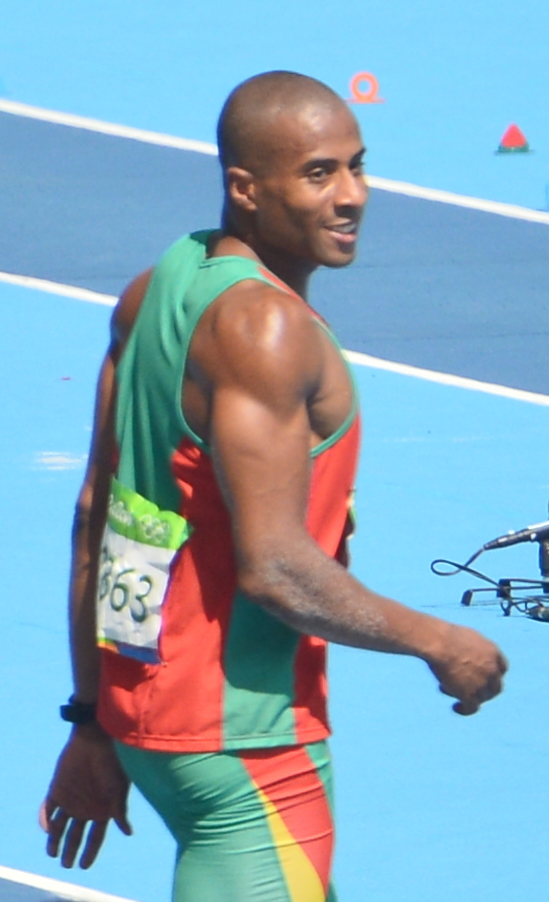 Christian Taylor lors du concours du triple saut au jo de Rio 2016